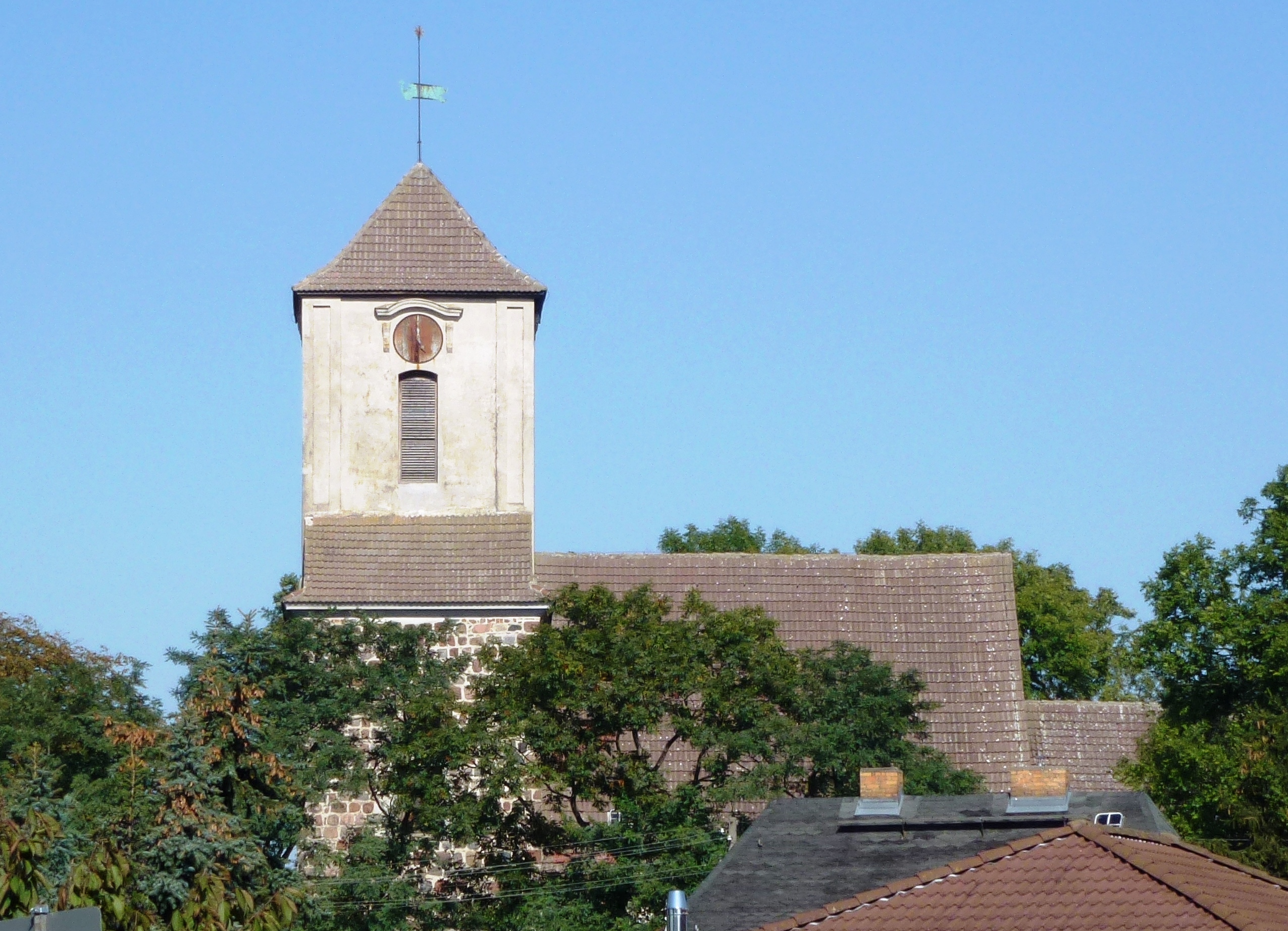 Feldsteinkirche Cultural heritage monuments in Angermünde Churches in Angermünde Cultural heritage monuments in Angermünde